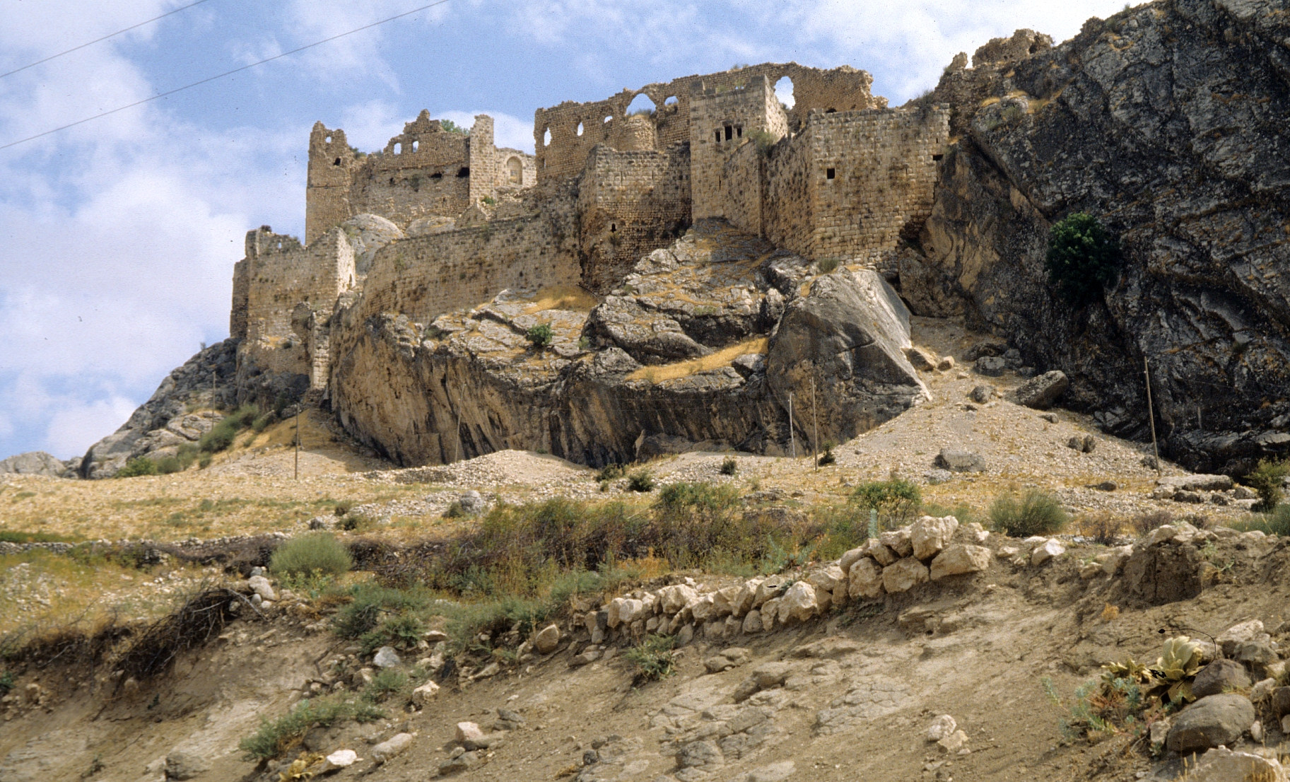 Arsameia am Nymphaios, Türkei, Kommagene, ehemalige Königsresidenz und später mamelukischer Gouverneurssitz Yenikale